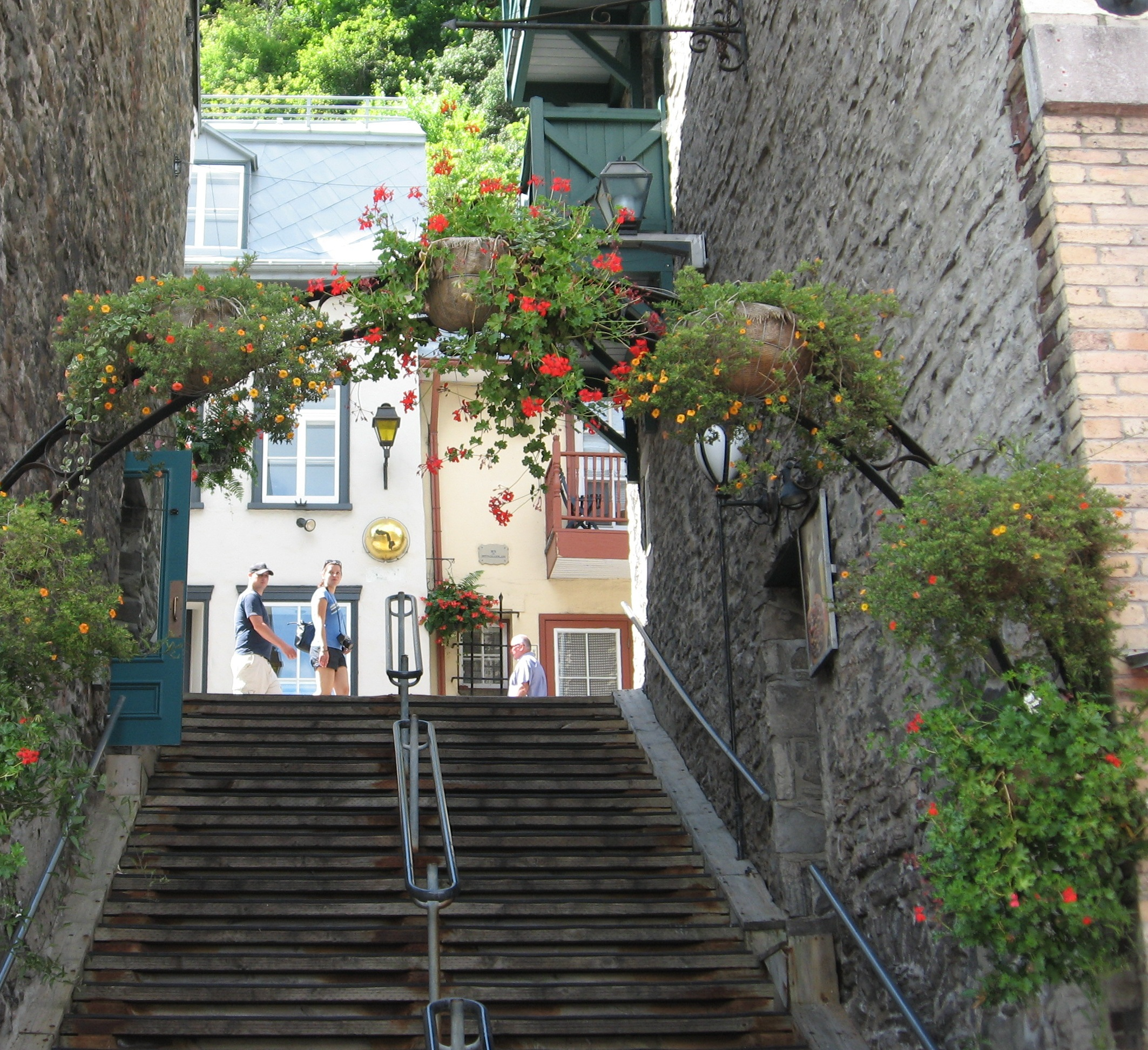 Escalier du Quai-du-roi, situé à la Place Royale, entre la rue Petit-Champlain et le boulevard Champlain. Compte 30 marches. Refait à la fin du XIXe siècle. Réf.